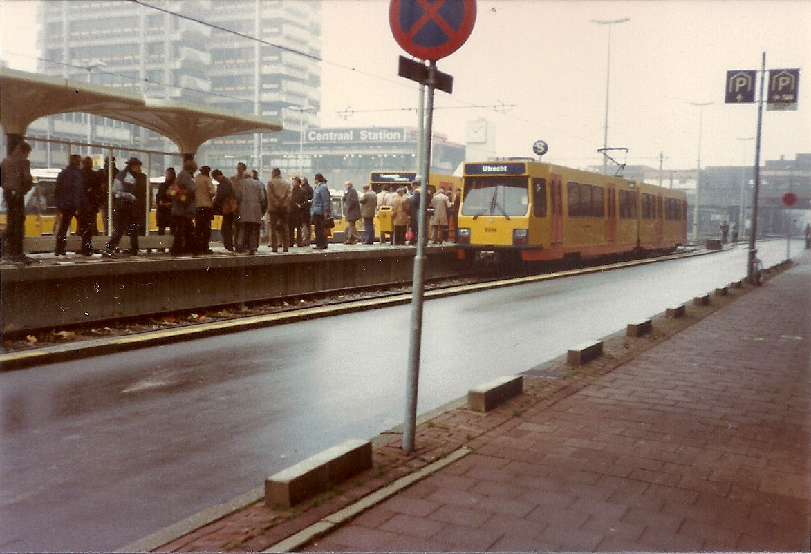 Sneltramhalte Moreelsepark tijdens een NVBS-excursie, vier weken voor de officiële opening. De halte is in 2009 gesloten.